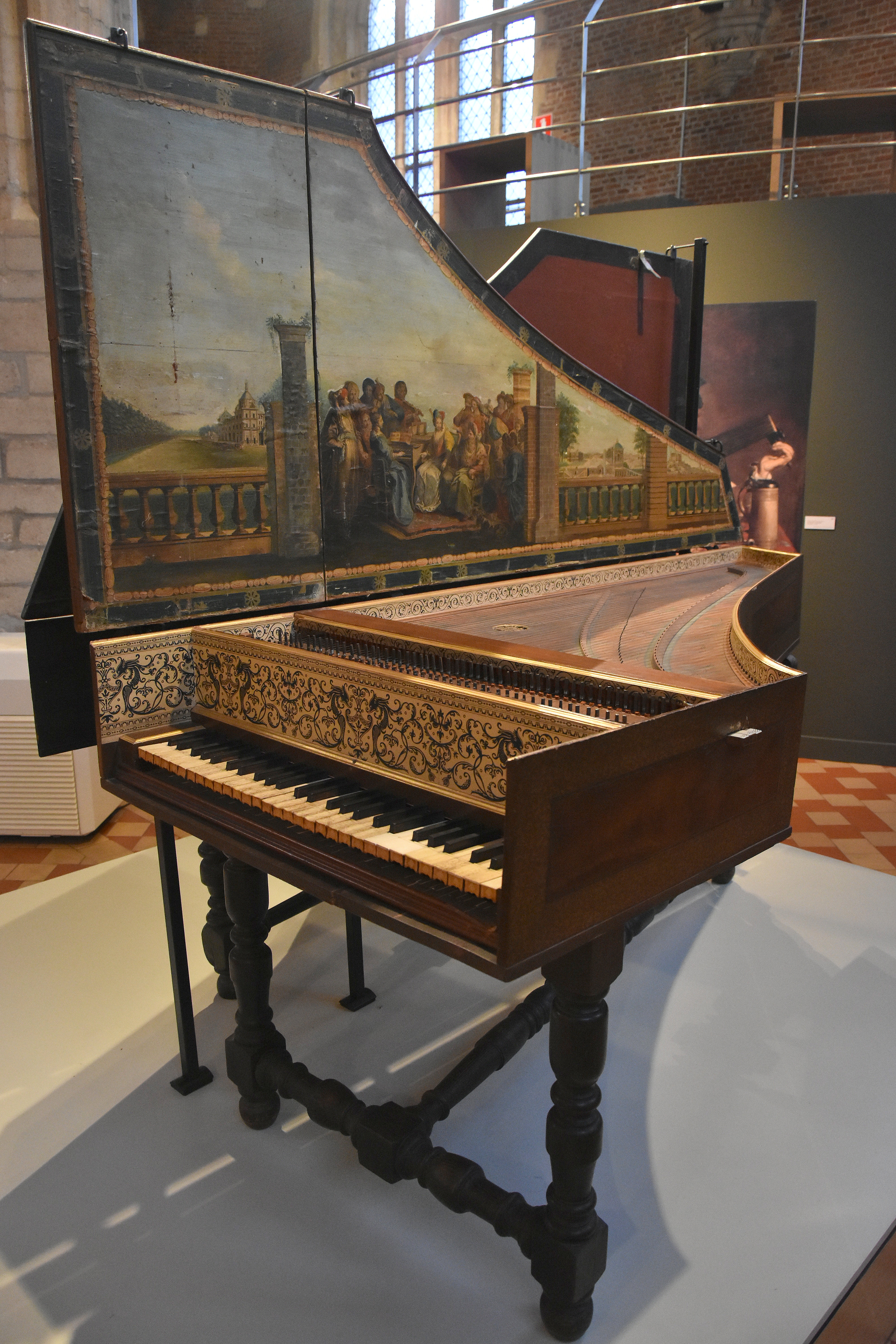 Andreas Ruckers (I en of II) Klavecimbel (1646) Vleeshuis Antwerpen 27-12-2018